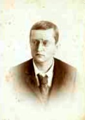 Henri Borel